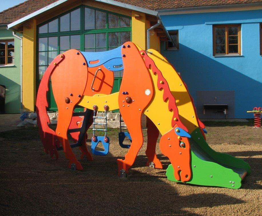 Farma - koník